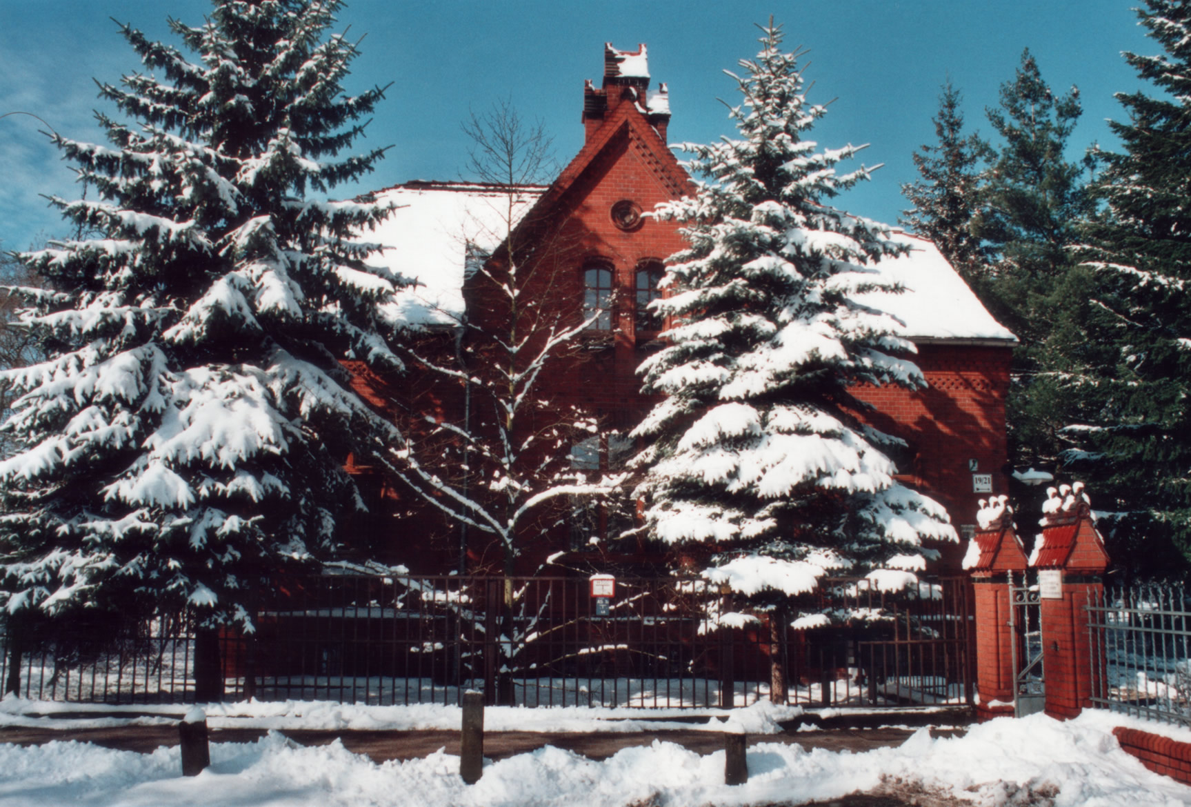 Kirchhof St. Bartholomäus: Verwaltungsgebäude des Friedhofs im Winter